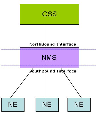 Диаграмма расположения северного и южного интерфейса в архитектуре системы управления сетью связи.